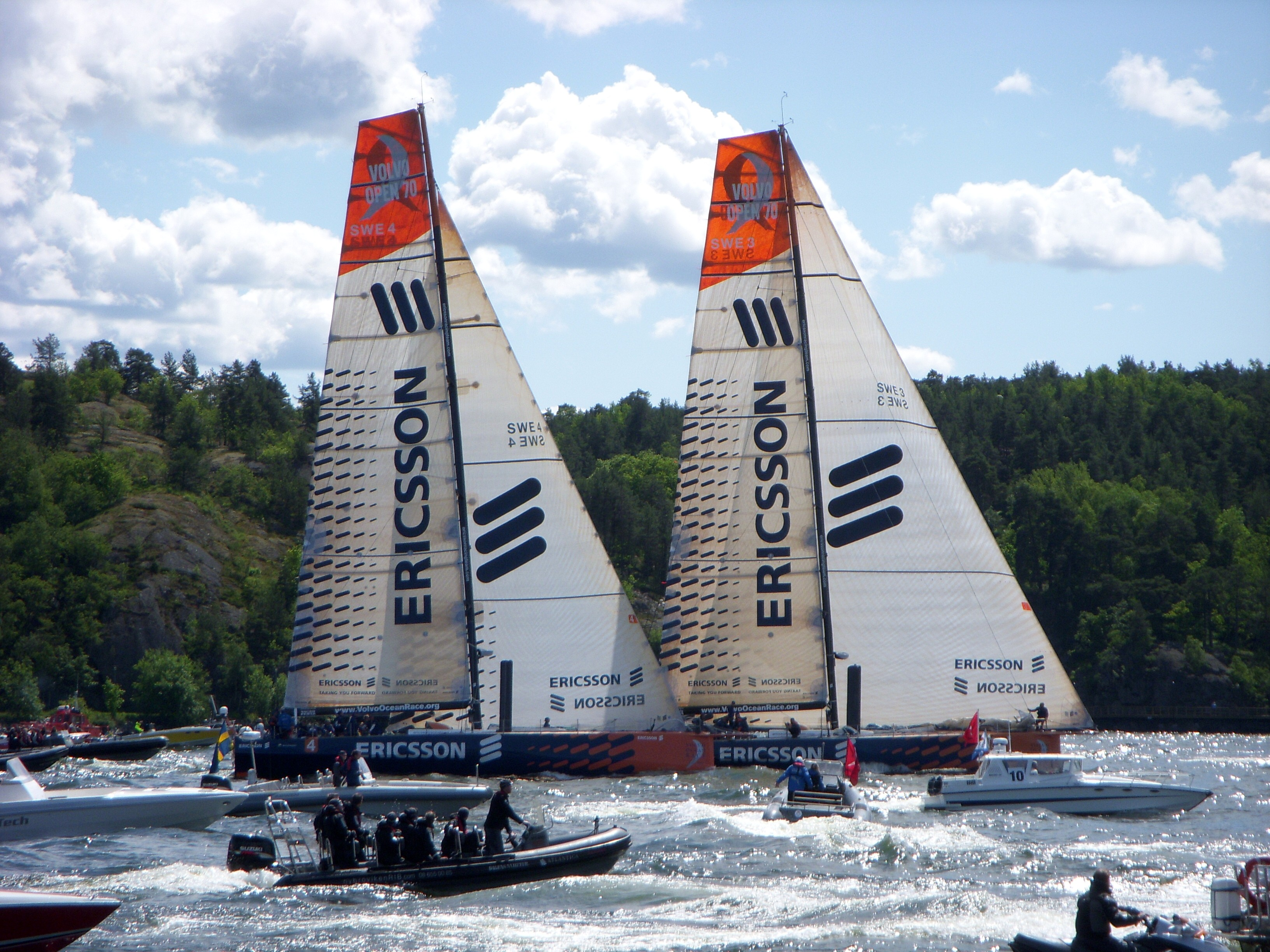 Volvo Ocean Race 2008/2009, Stopover Stockholm, SWE 3 + SWE 4